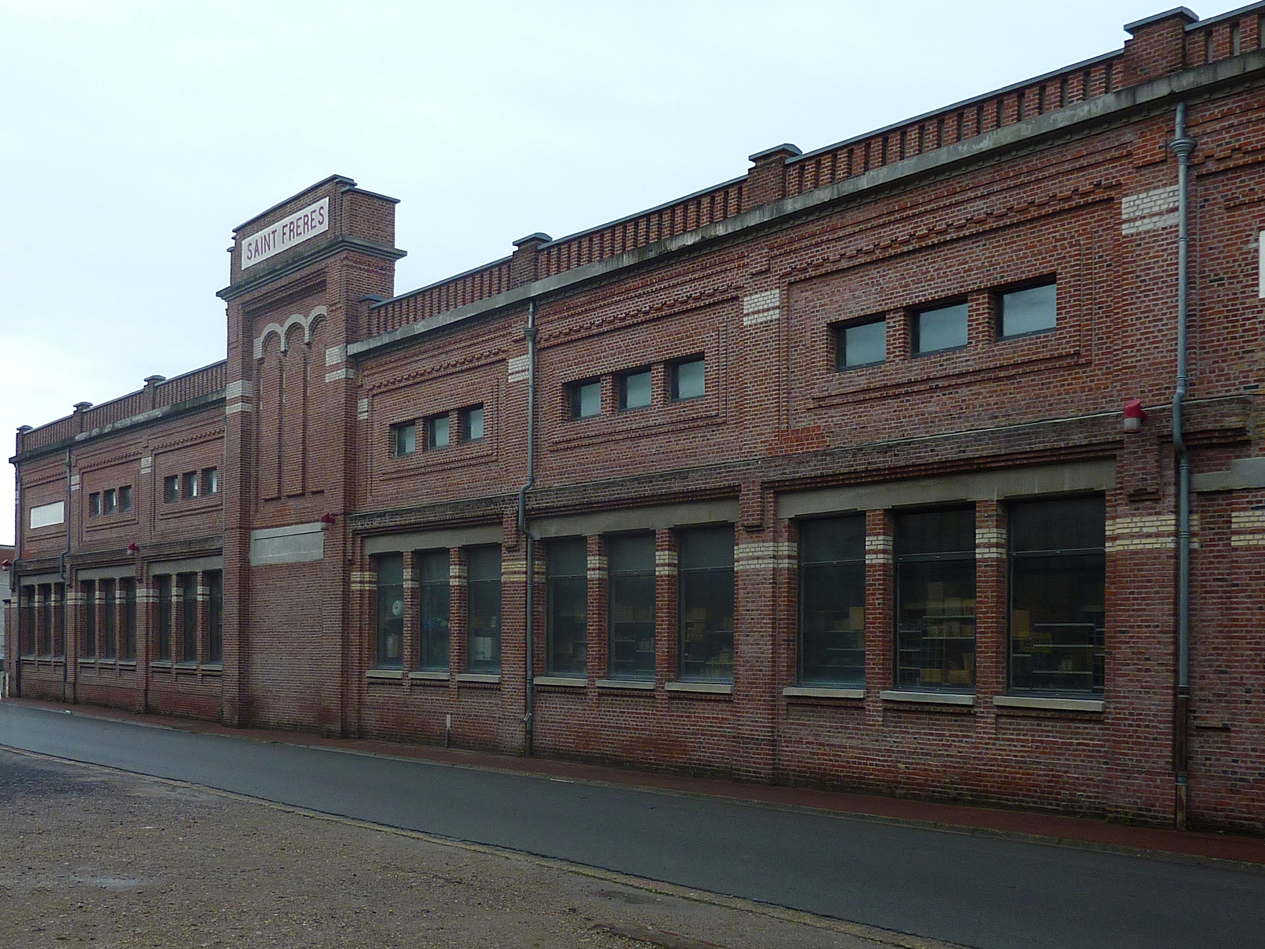 Ancienne manufacture des frères Saint - Flixecourt Picardie France